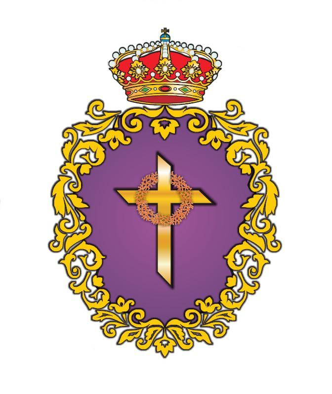 Escudo de la Real Cofradía de Nuestro Padre Jesús Nazareno, las Cruces y Santísima Virgen del Rosario de Chinchilla